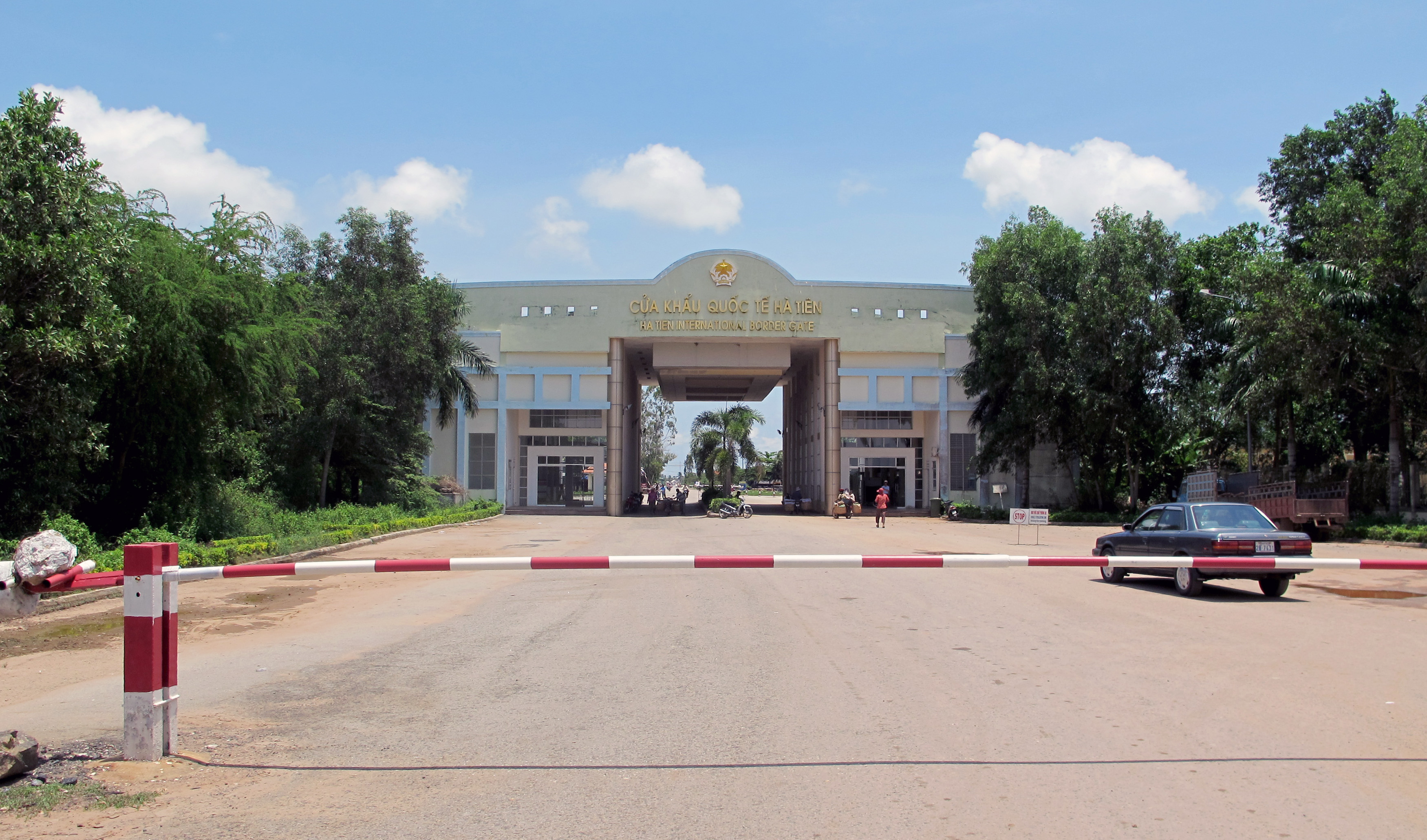 Vietnamese border gate at Hat Tien